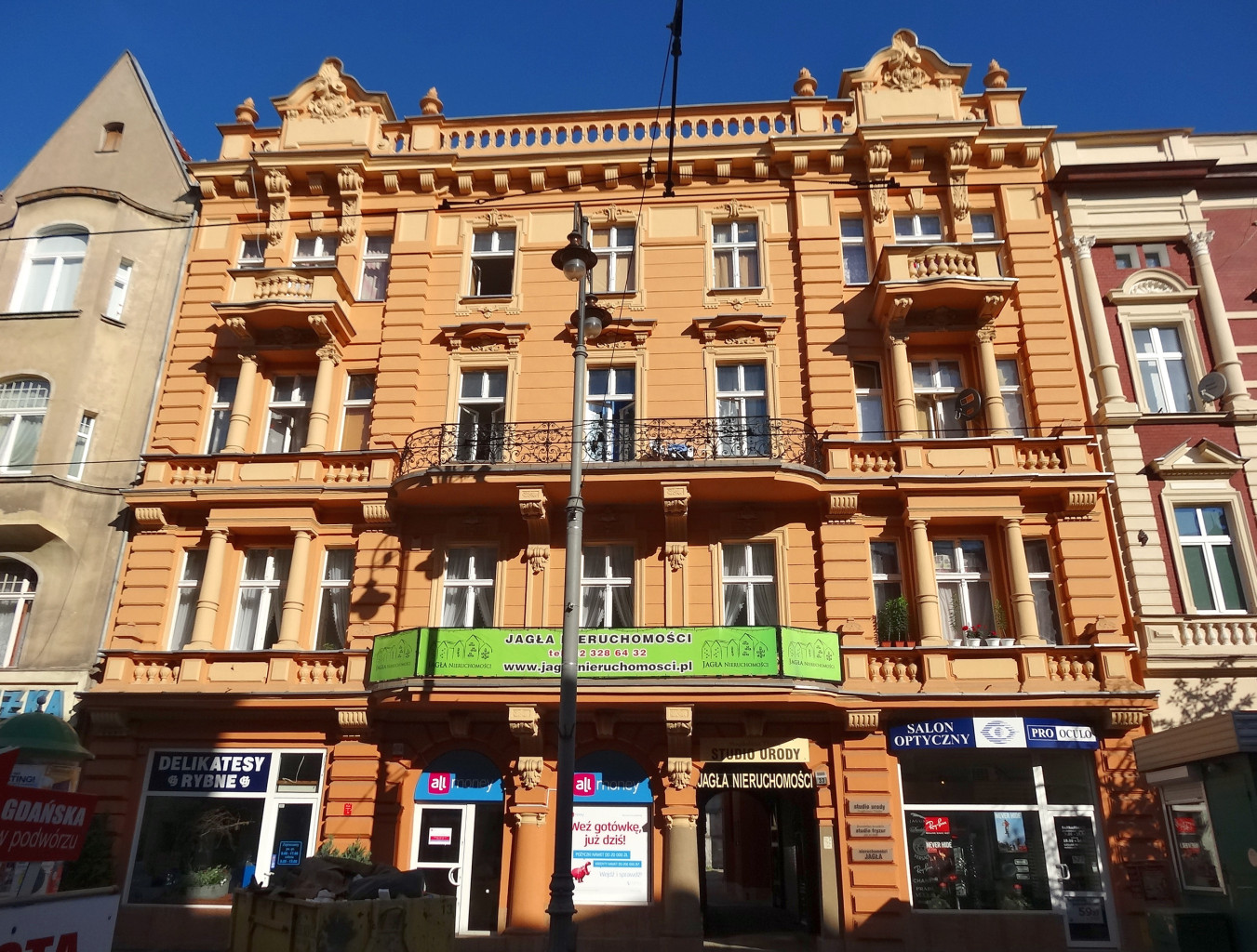 Kamienica przy ul. Gdańskiej 33 w Bydgoszczy